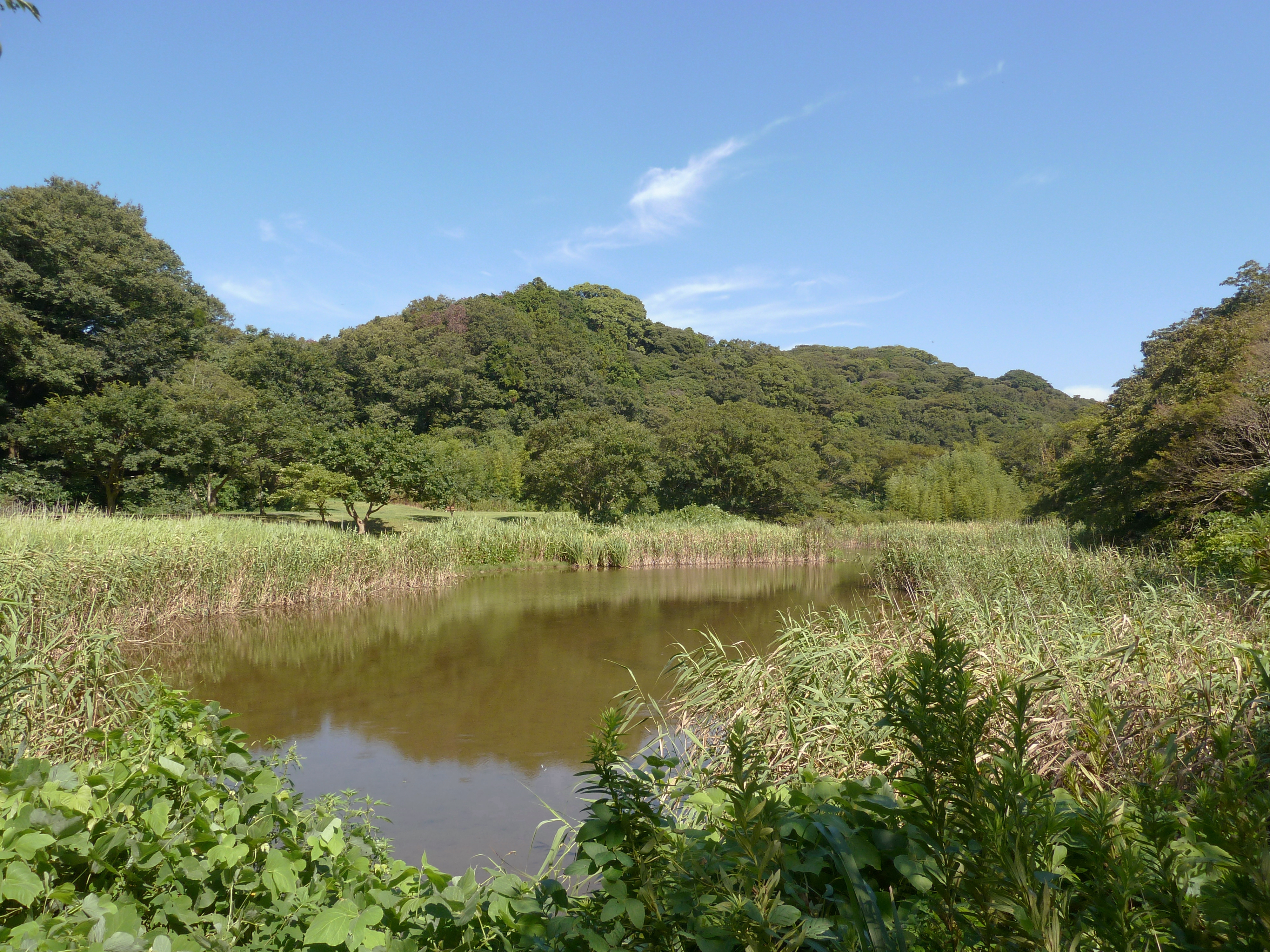 池子の森自然公園の池(神奈川県逗子市)